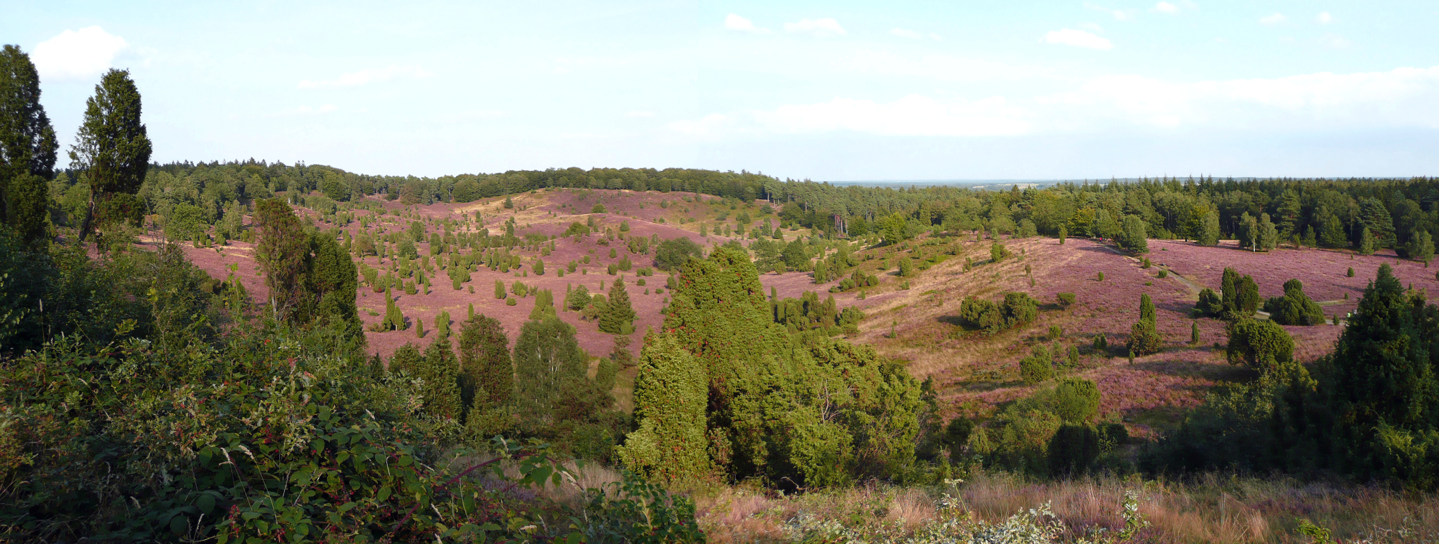 Totengrund mit Blick zur Südseite